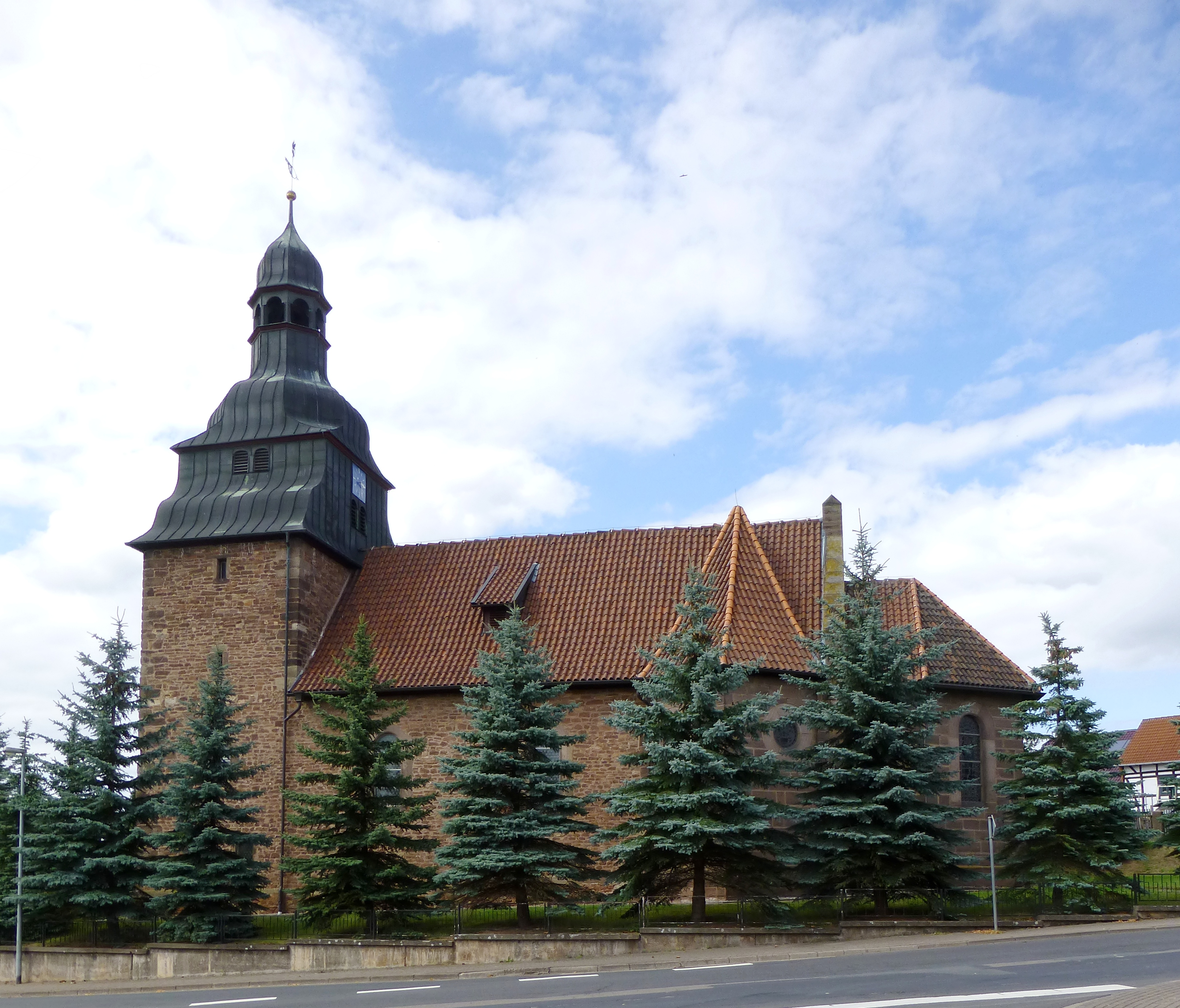 Kath. Kirche St. Georg in Günterode, Stadt Heiligenstadt, Landkreis Eichsfeld. Am Portal datiert 1713